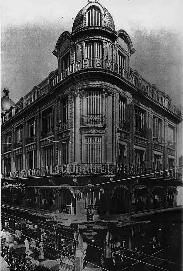 Calle Florida Premier établissement vers 1907